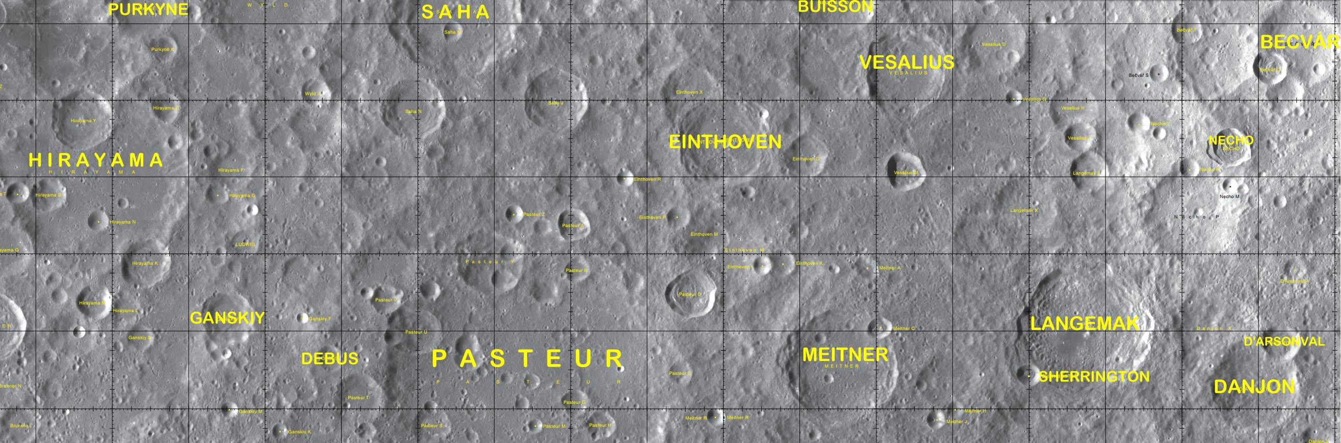 Cráter lunar Einthoven. Localización. (Imagen LROC)